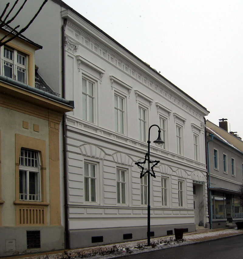 Former Hotel Lehner in Pinkafeld, Burgenland, Austria